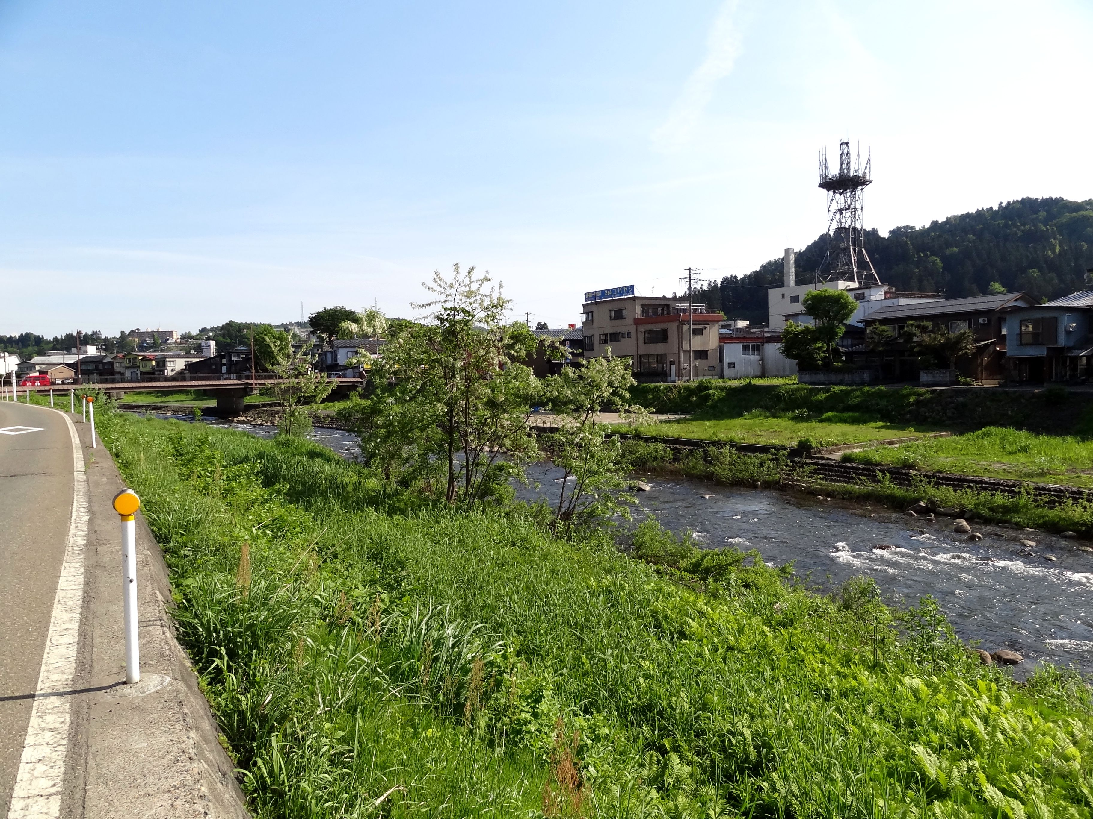 刈谷田川（長岡市金沢付近）